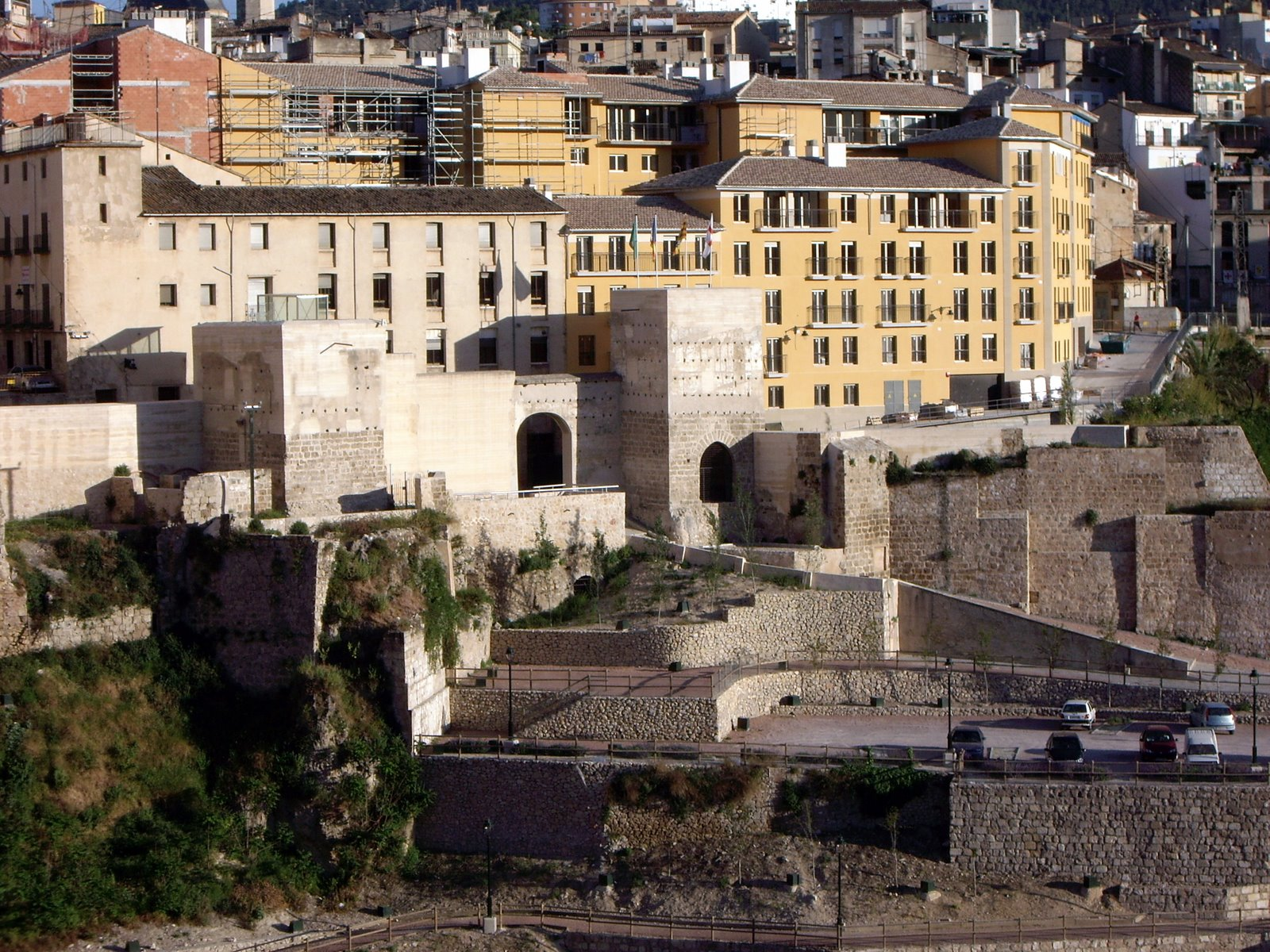 Vista de l'arc de Sant Roc des de el pont de Sant Jordi (Alcoi)